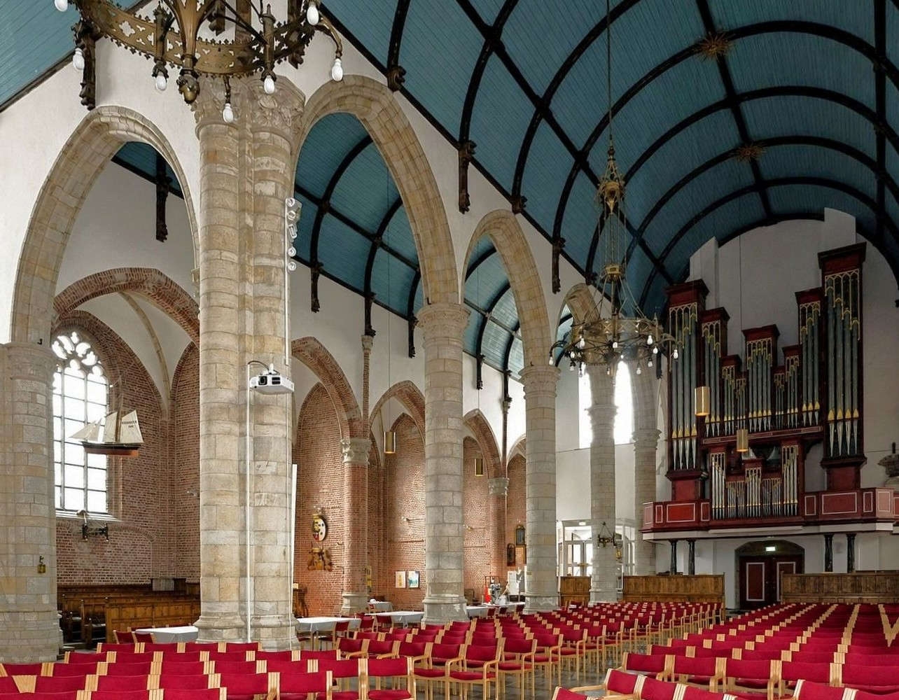 Sint Jacob (Vlissingen)